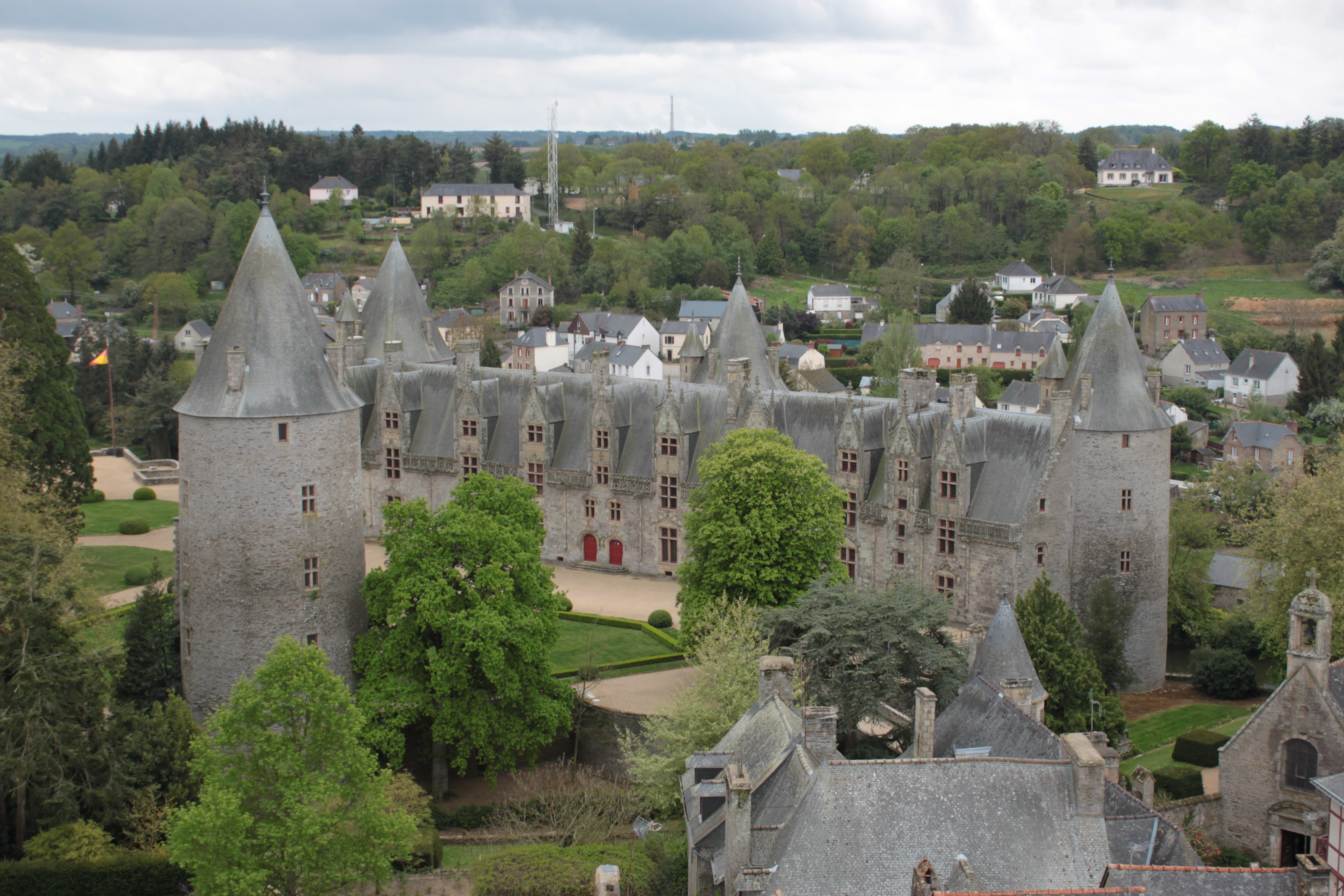 Château, vu du clocher de Notre-Dame. Fr-56-Josselin.